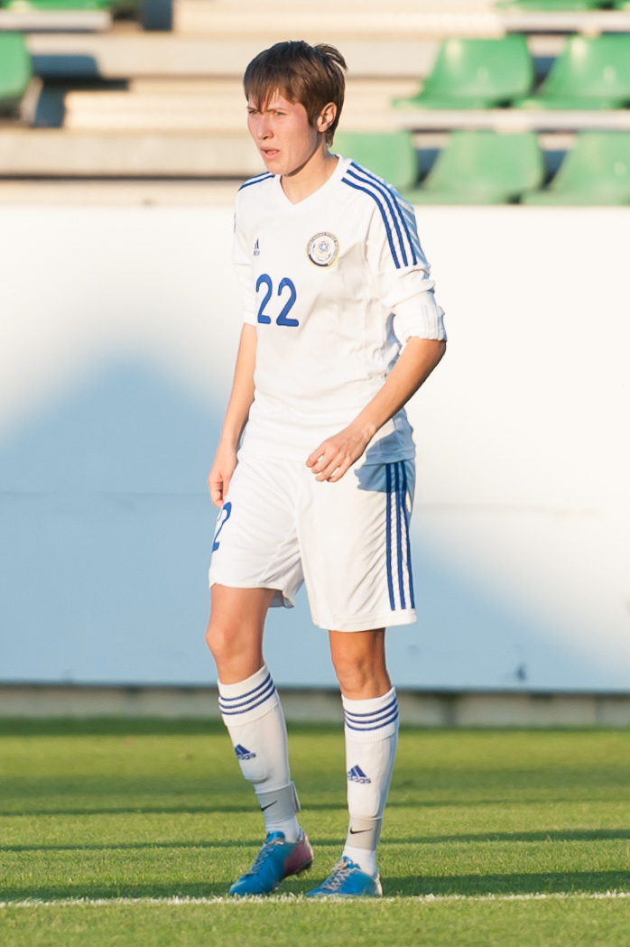 Fußball FIFA Women's World Cup 2015 Qualifying Round Österreich gegen Kasachstan Pasching, 17. September 2014 Yekaterina Babshuk